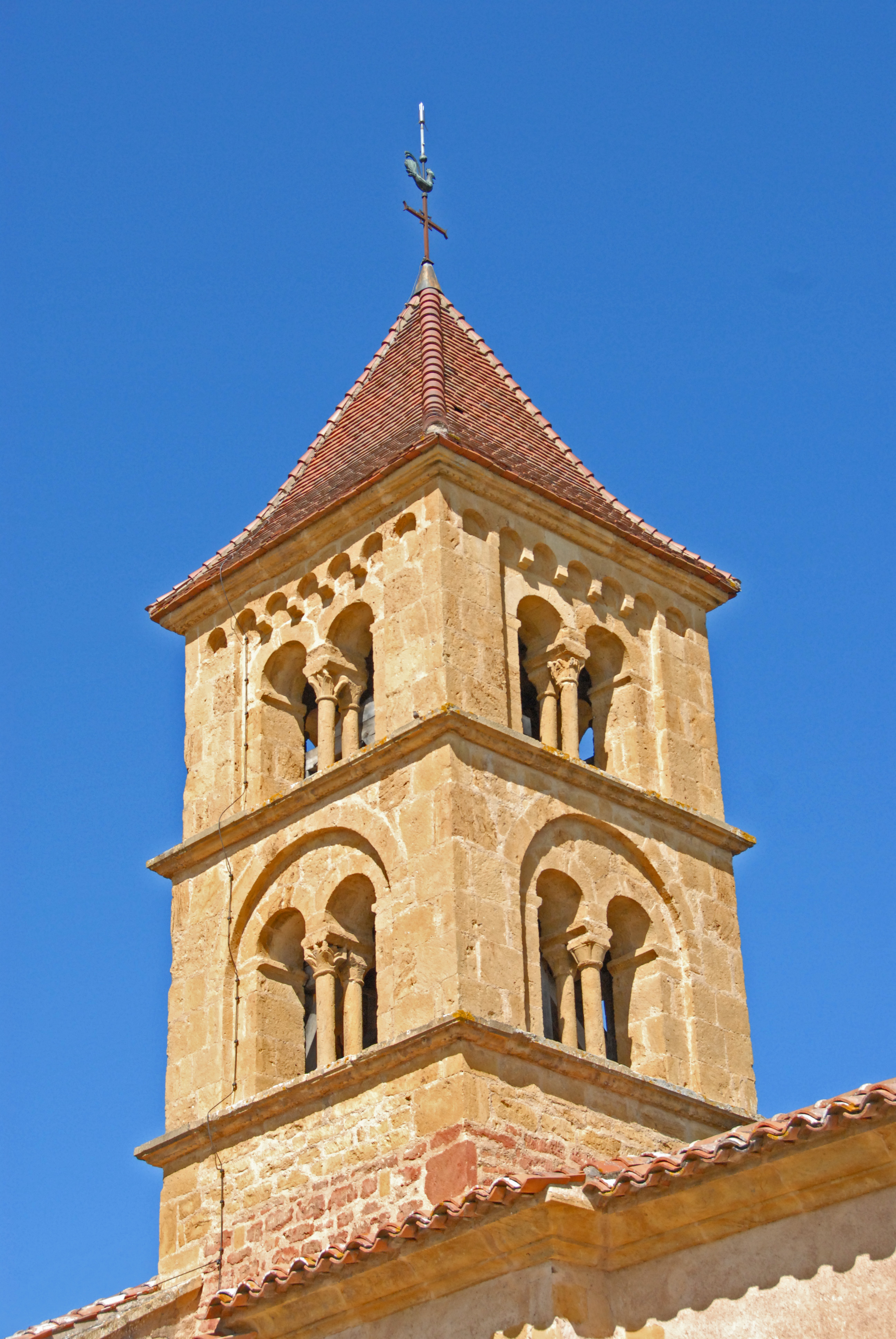 Sts-Pierre-et-Paul de Montceaux-l'Étoile, Glockenturm von SO